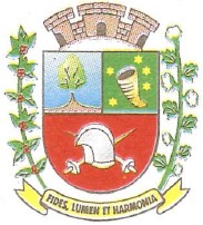 Brasão de Armas do município de Lutécia - SP - Brasil.